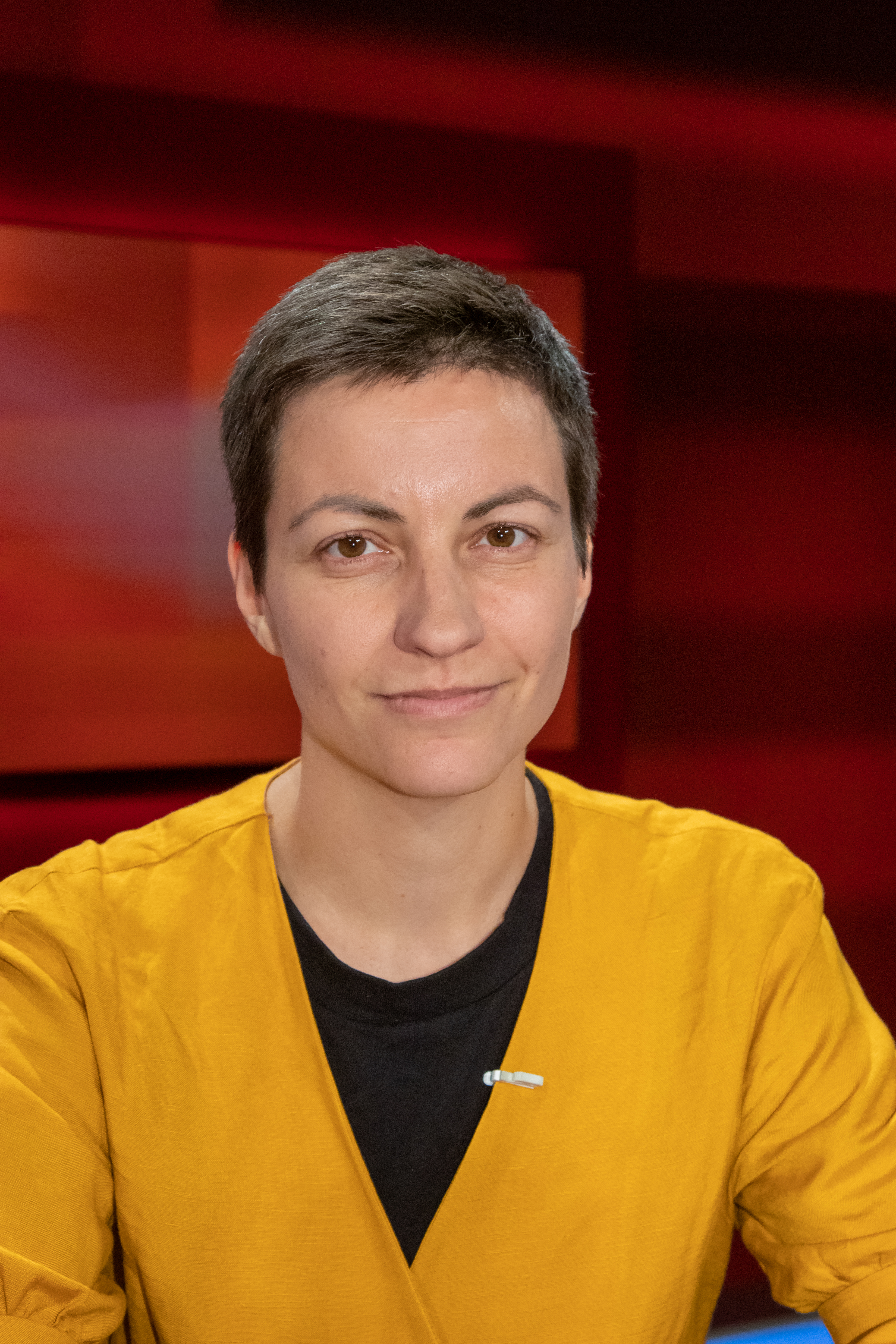 Ska Keller in 2019 in der WDR-Sendung "hart aber fair" 2019-07-08